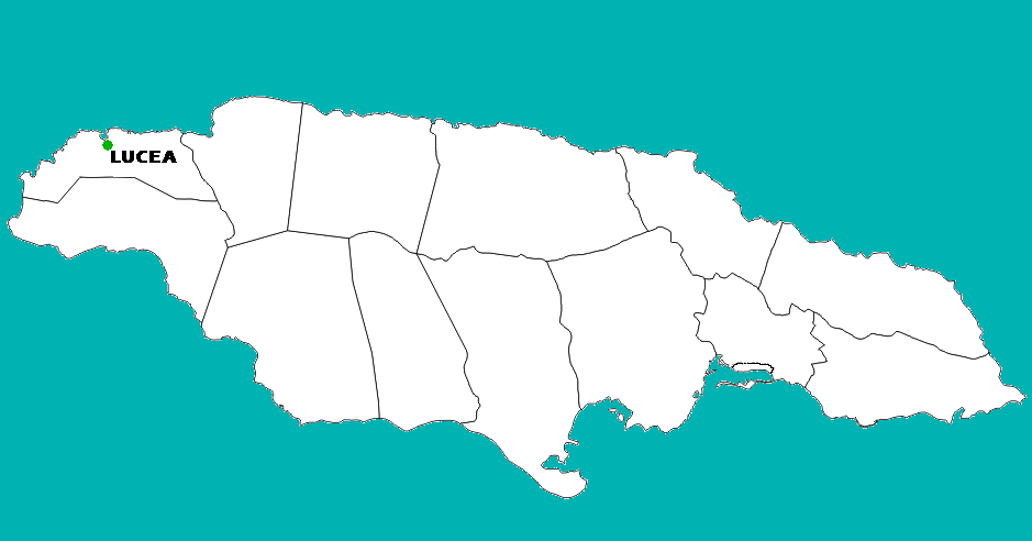 Localización, en el mapa jamaiquino, de la ciudad de Lucea.